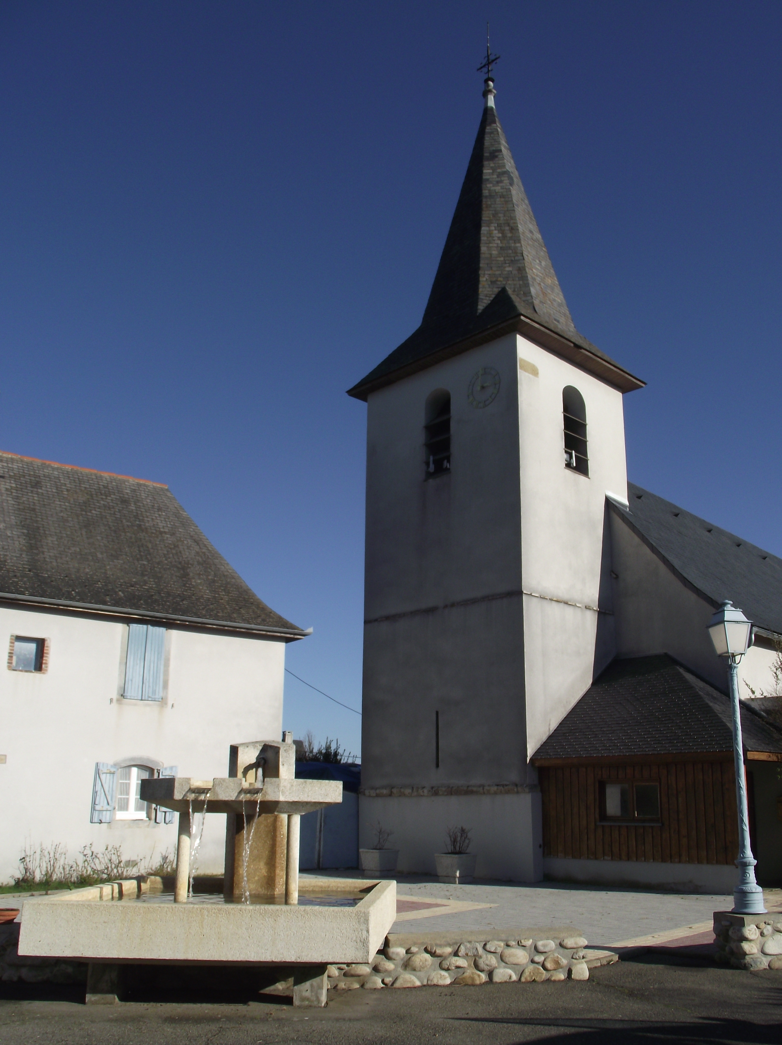 Église de Poumarous (Hautes-Pyrénées, France)